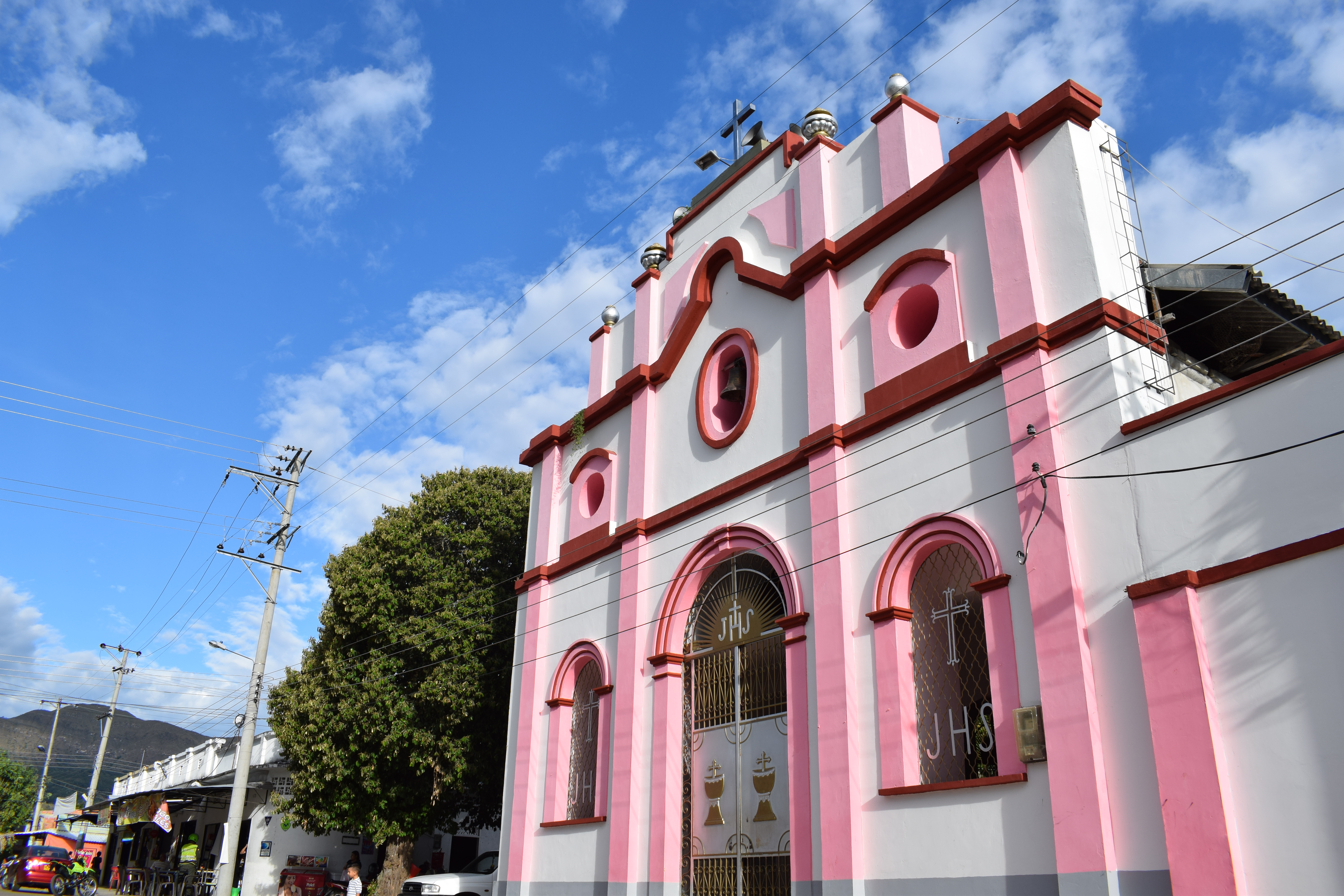 iglesia Santa Rosa de Lima